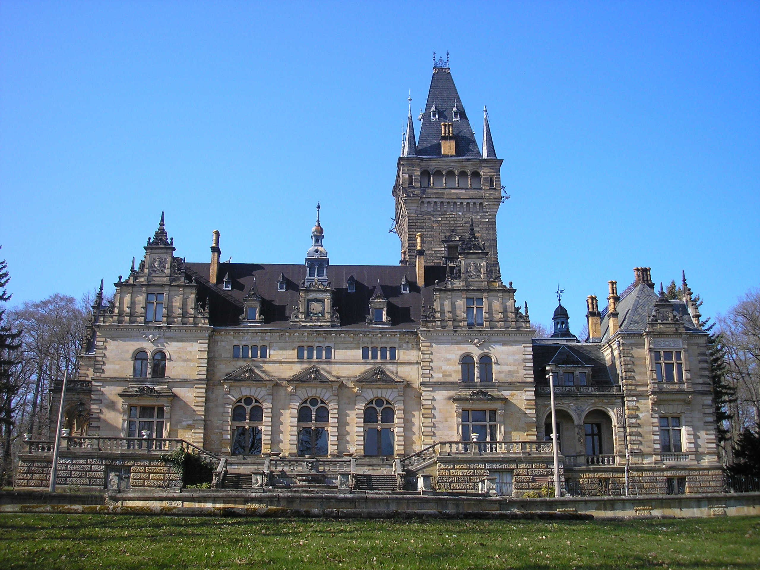 Das Jagdschloss Hummelshain (Thüringen) von Süden.